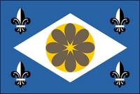 Bandeira do município de Ibirataia